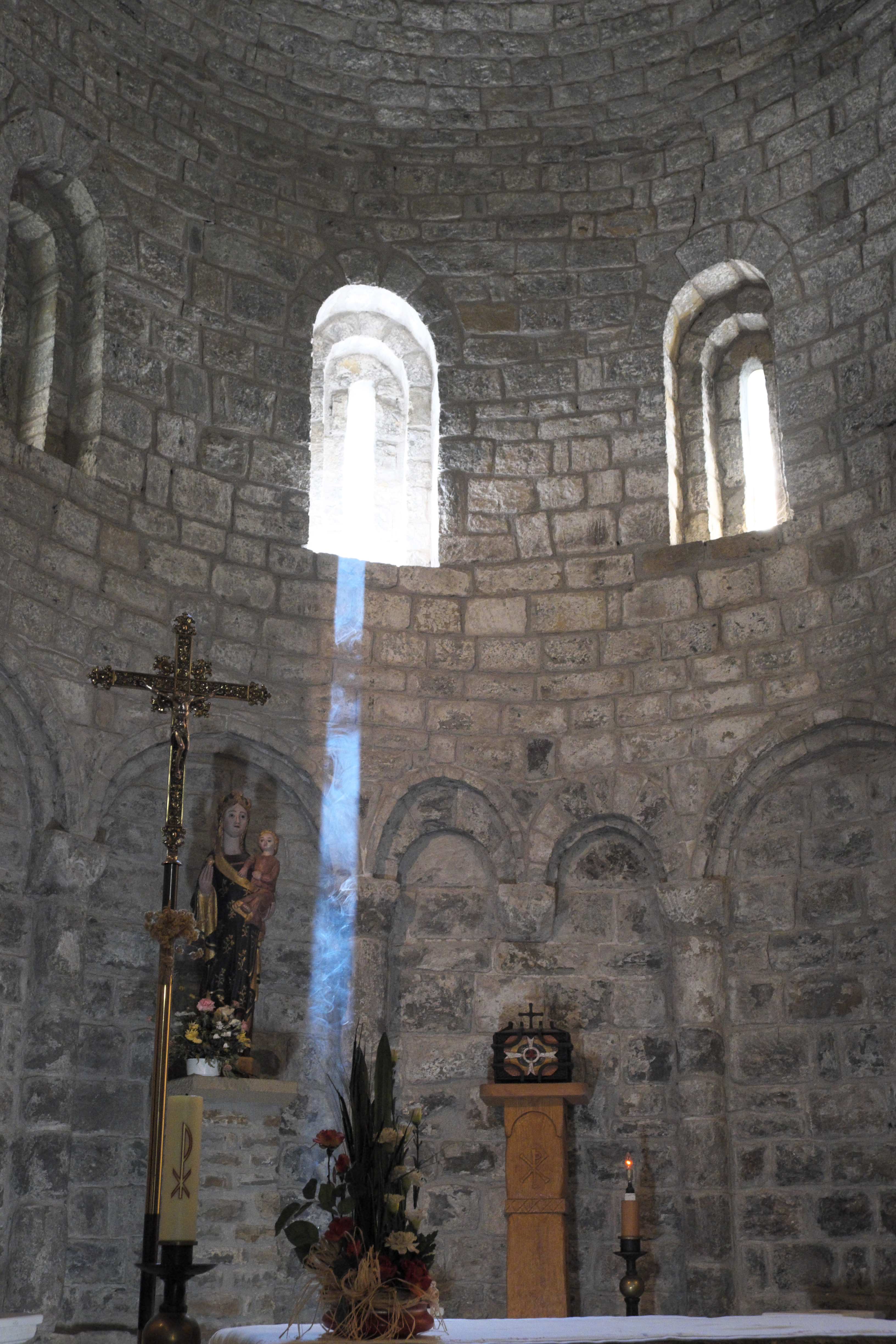 Ehemalige Benediktinerklosterkirche Santa María des Klosters Santa María de Obarra in Beranuy in der Provinz Huesca (Aragón/Spanien), Lichtstrahl